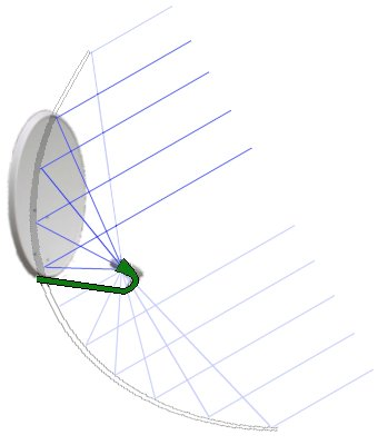 Eine Offsetantenne ist ein Ausschnitt aus einer Parabolantenne.